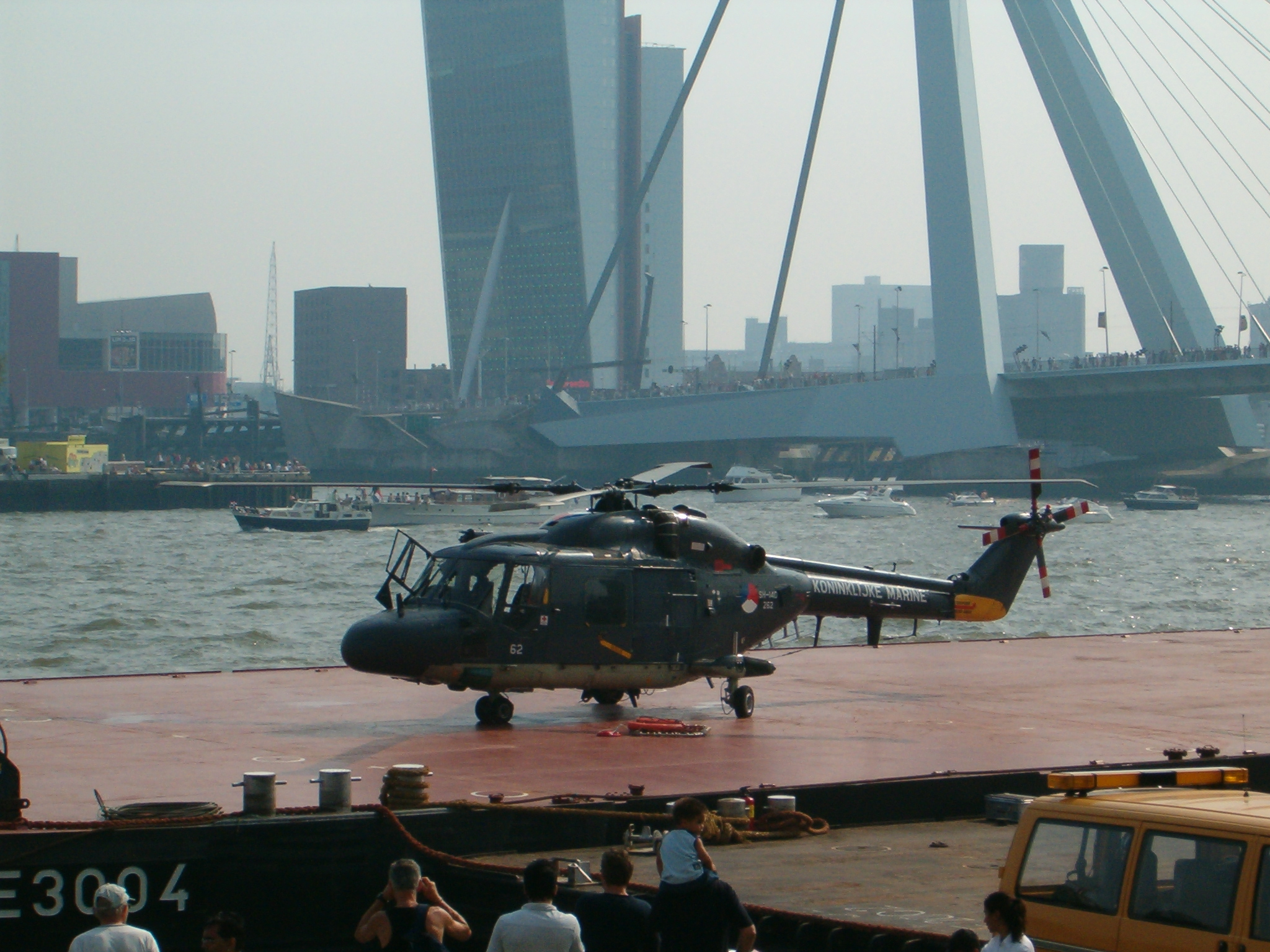 Wereldhavendagen (World Harbor Days)